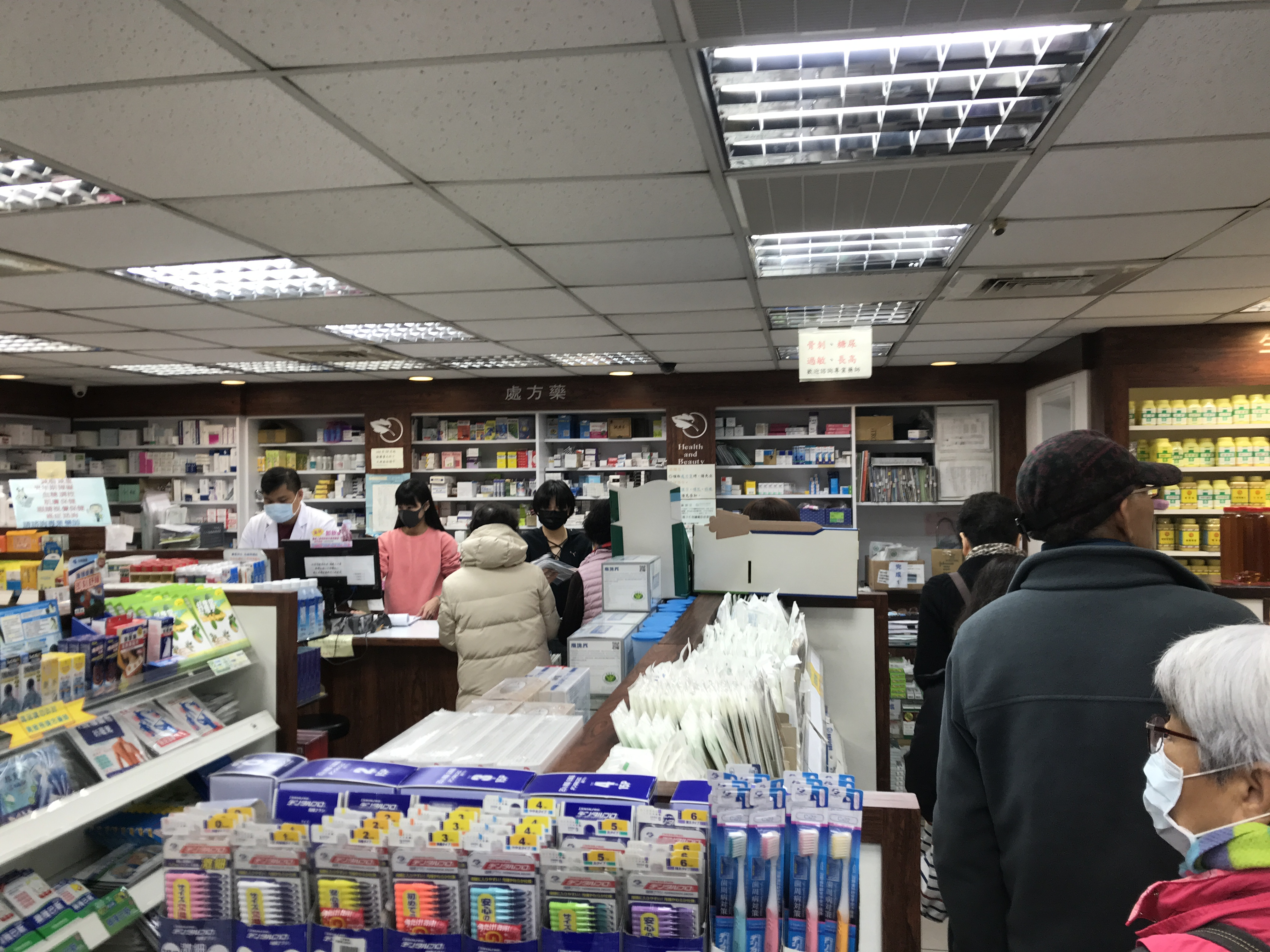 2020年2月7日上午，新型冠狀病毒肺炎大流行期間，領到號碼牌的民眾排隊進入益華藥局買口罩。